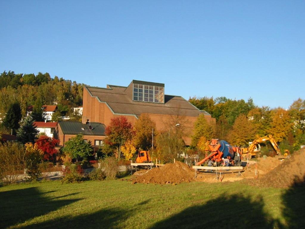 Kirche St. Andreas in Runding